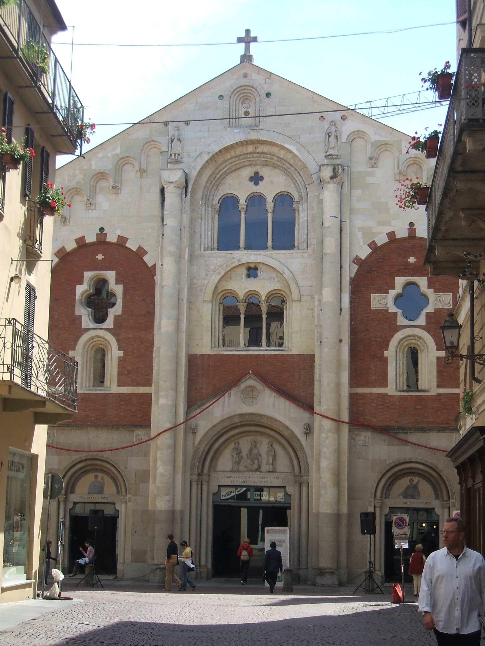 Facciata del duomo di Casale Monferrato